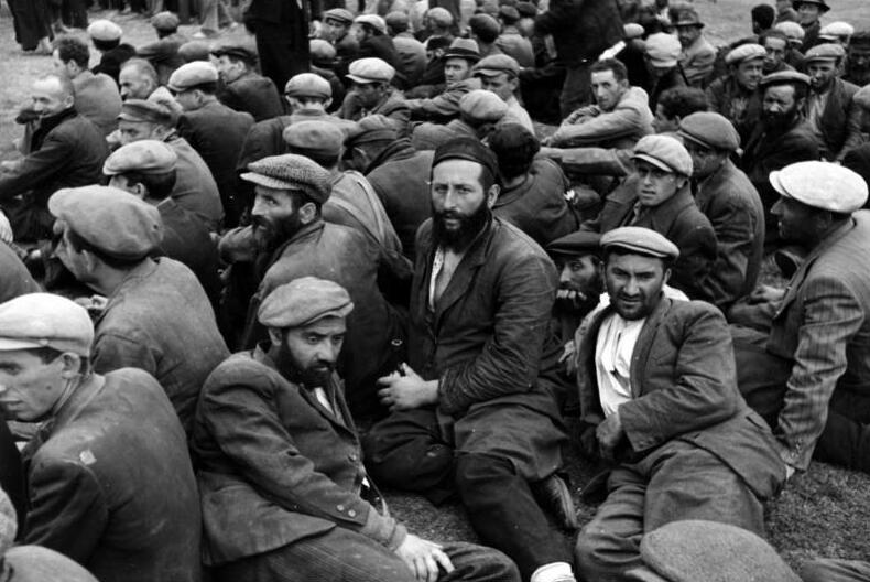 Judenlager Krakau